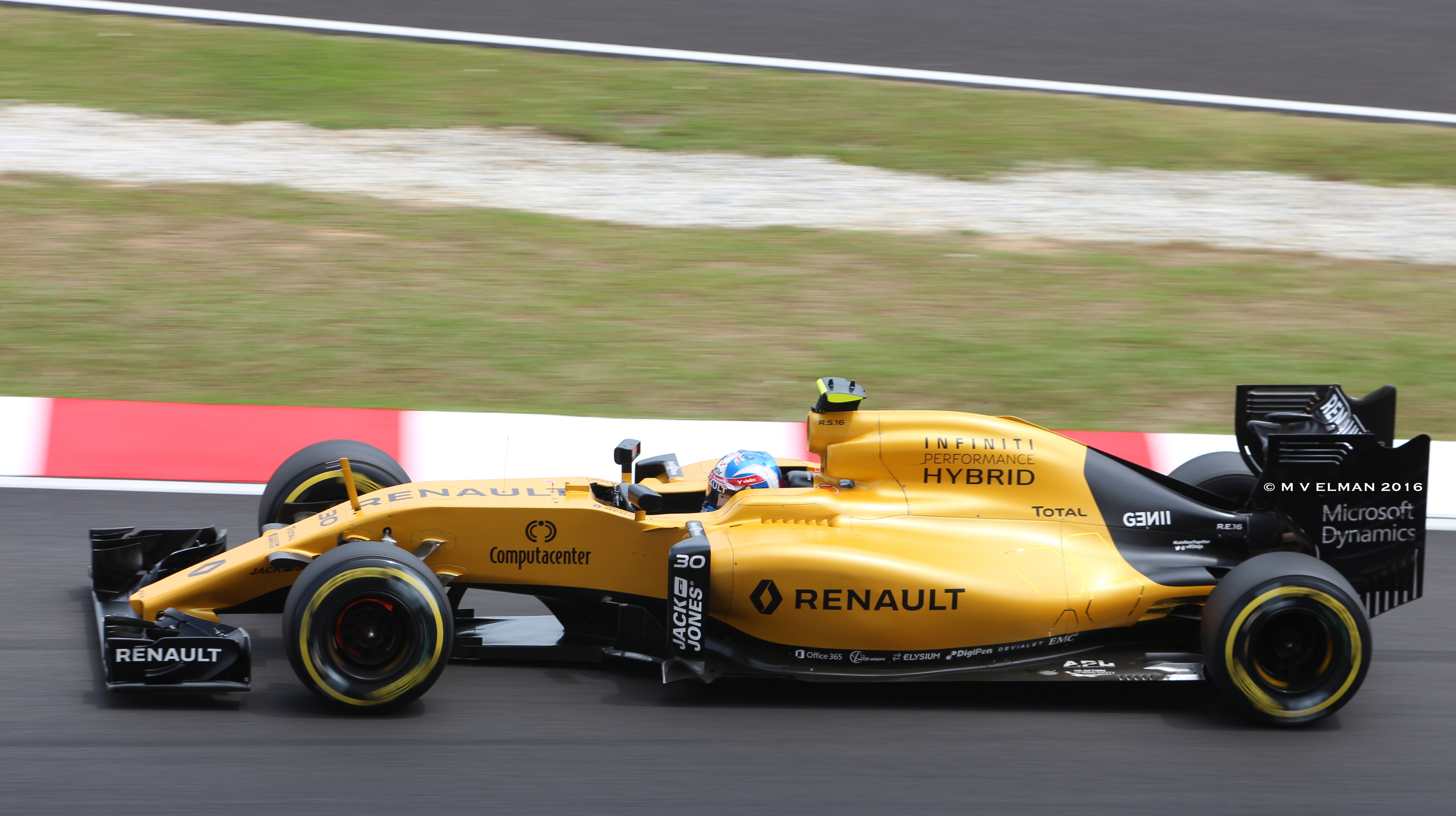 Jolyon Palmer - Renault F1 RS16